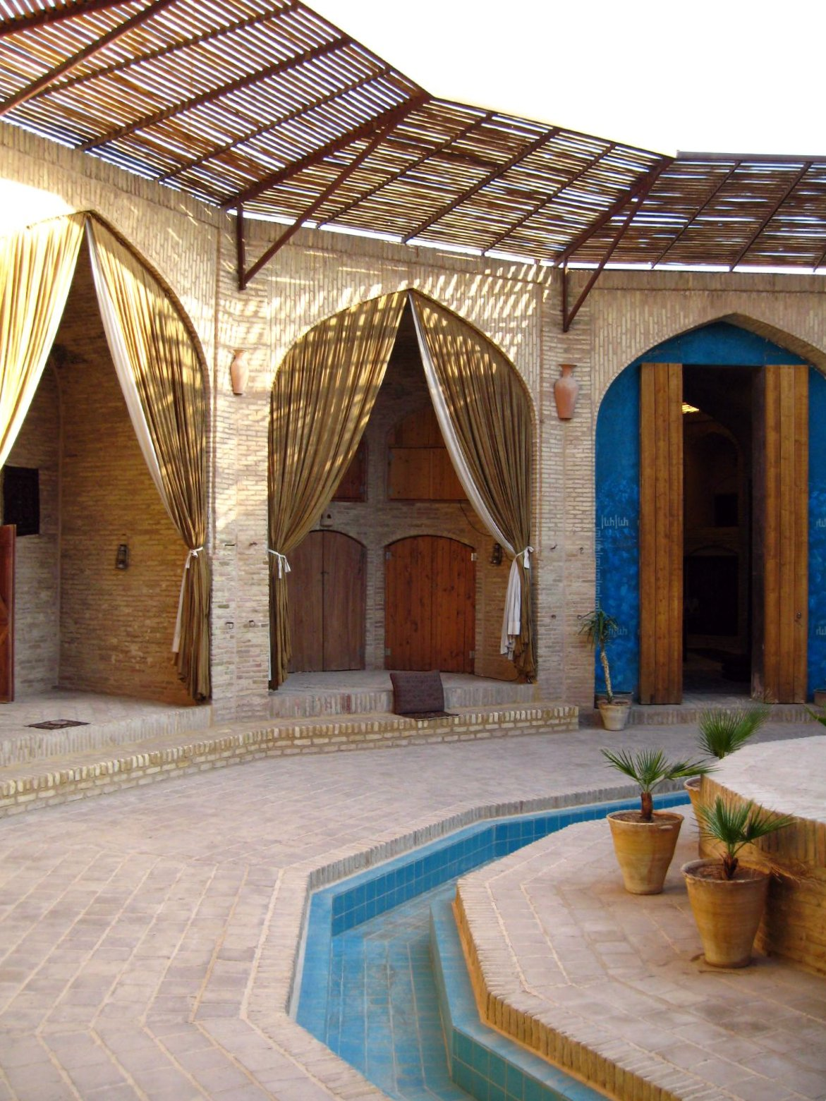 Caravanserai Zein-o-din, Yazd, Iran